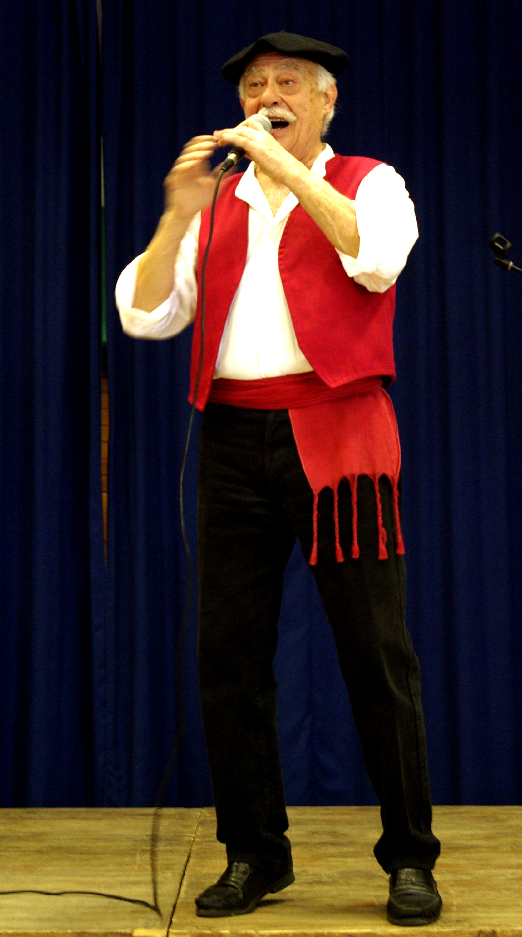 Edmond Duplan en concert à Nogaro